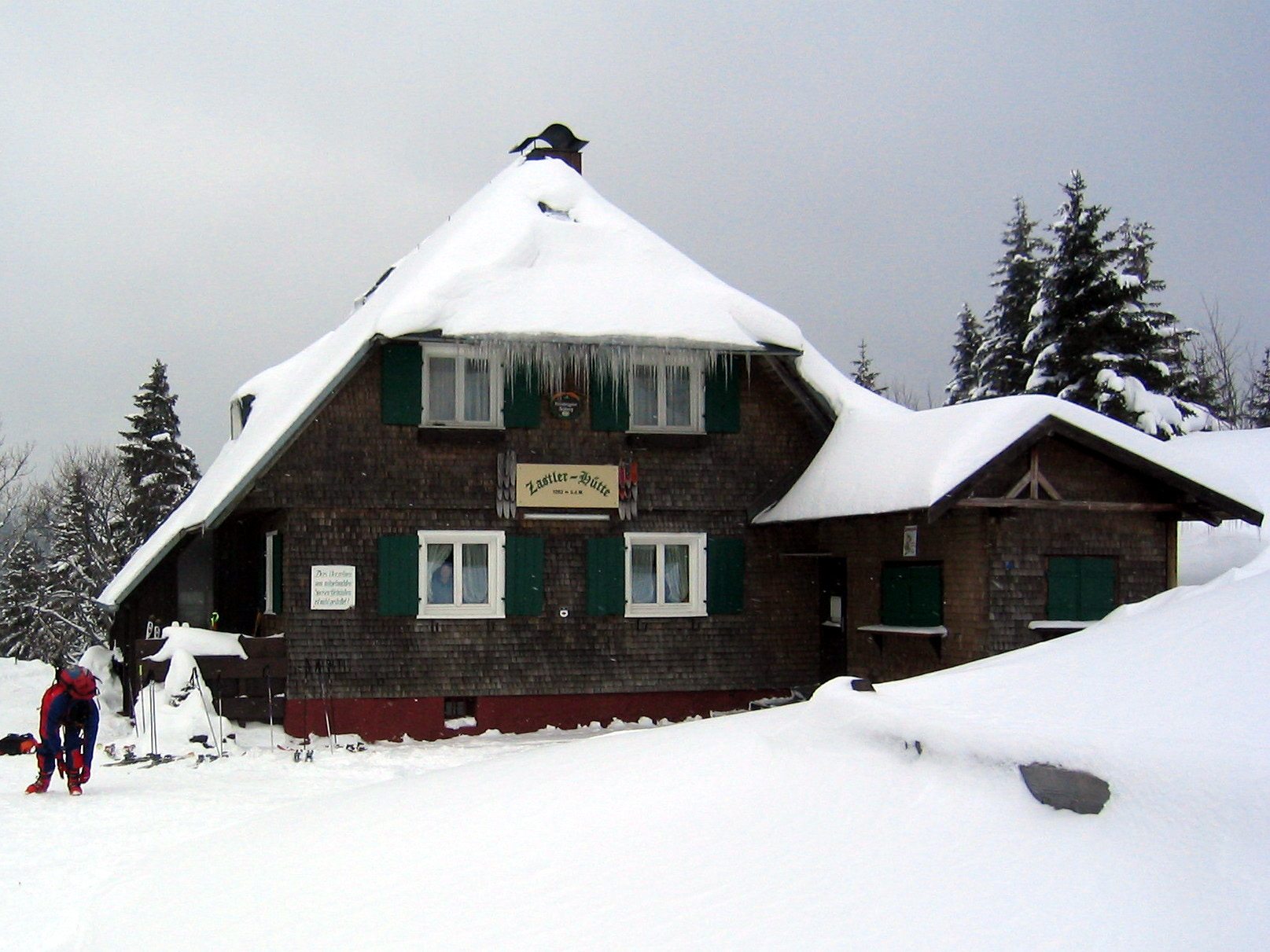 Zastler Hütte im Zastler Tal, einem Seitental des Feldbergs im Schwarzwald, Baden-Württemberg, Deutschland. Zastler Hut in the "Zastler Valley" (leading to the Feldberg in the Black Forest), Baden-Wurttemberg, Germany